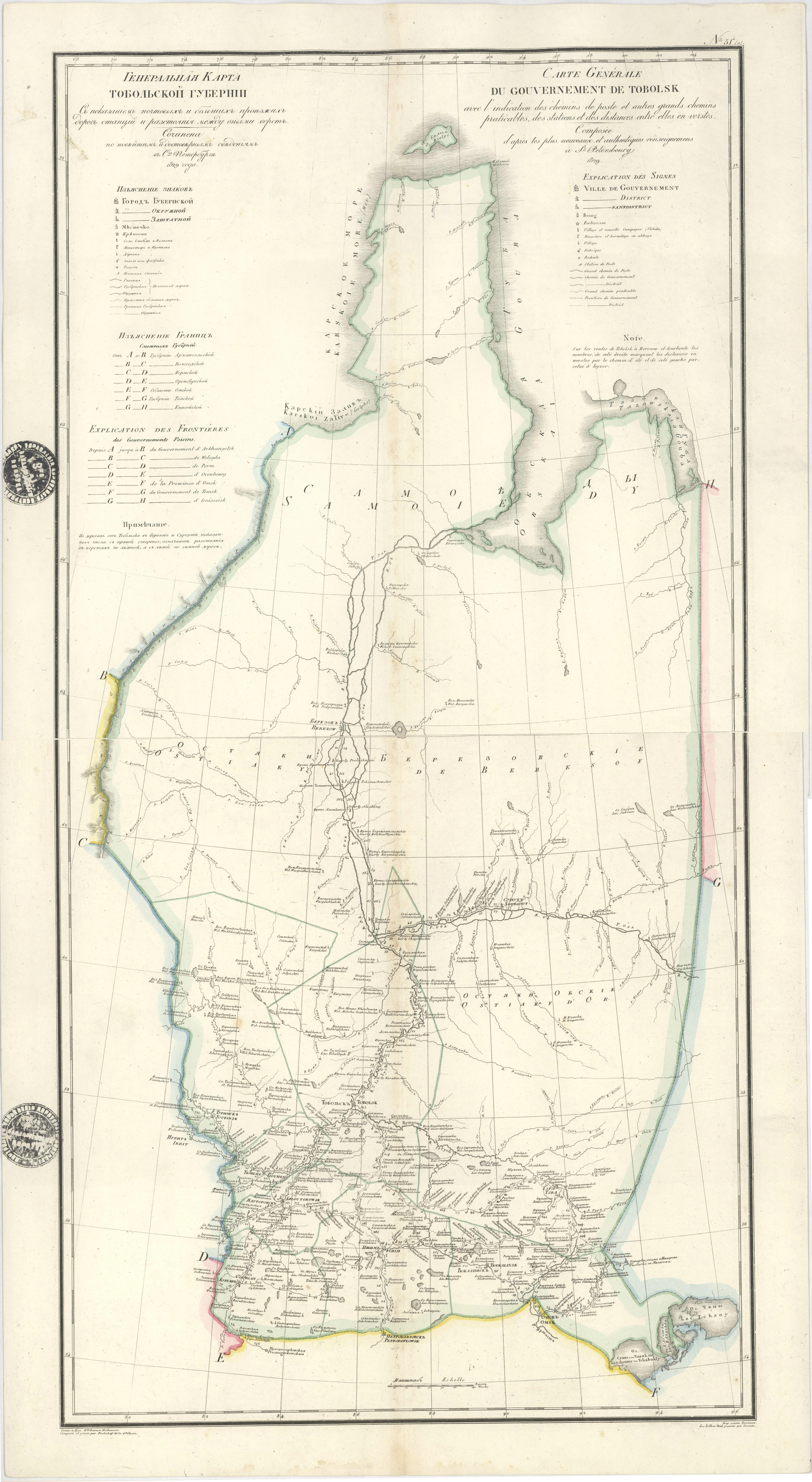 Генеральная карта Тобольской губернии с показанием почтовых и больших проезжих дорог, станций и разстояния между оными вёрст. Сочинена по новейшим достоверным сведениям в Санкт-Петербурге 1829 года.